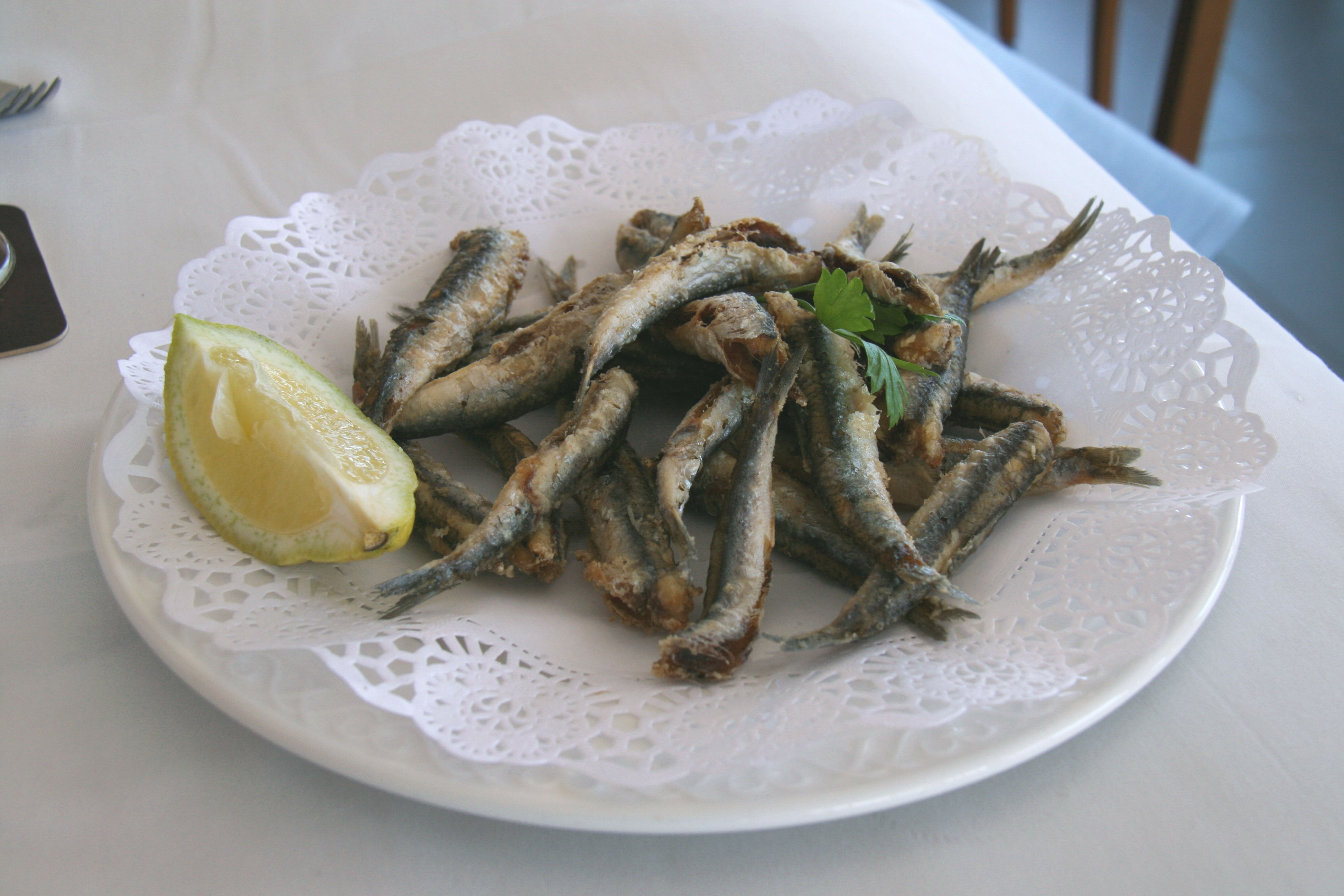 Boquerones Fritos (Costa Blanca)